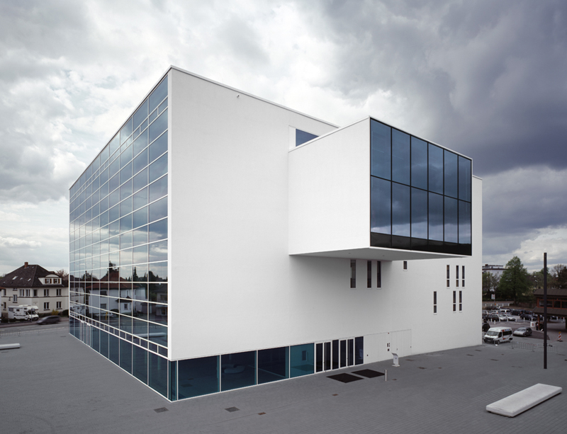 Theater Gütersloh. Ansicht von Südosten mit Studiobühne